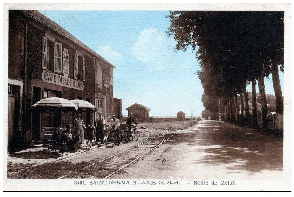 Café de Saint-Germain-Laxis avec les rails et la gare au fond. Image datant de 1935.